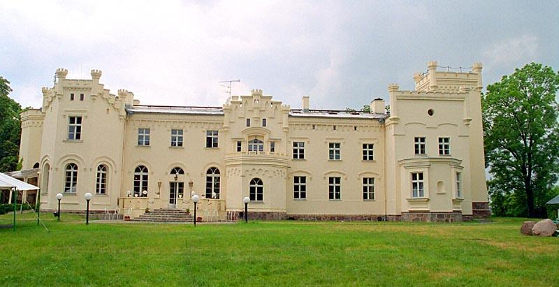 Krzeslice in Poland